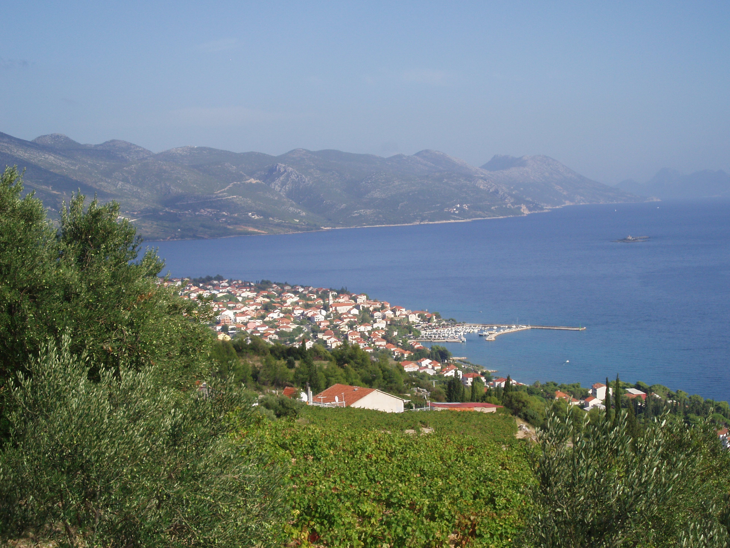 Pohled na Orebič od františkánského kláštera